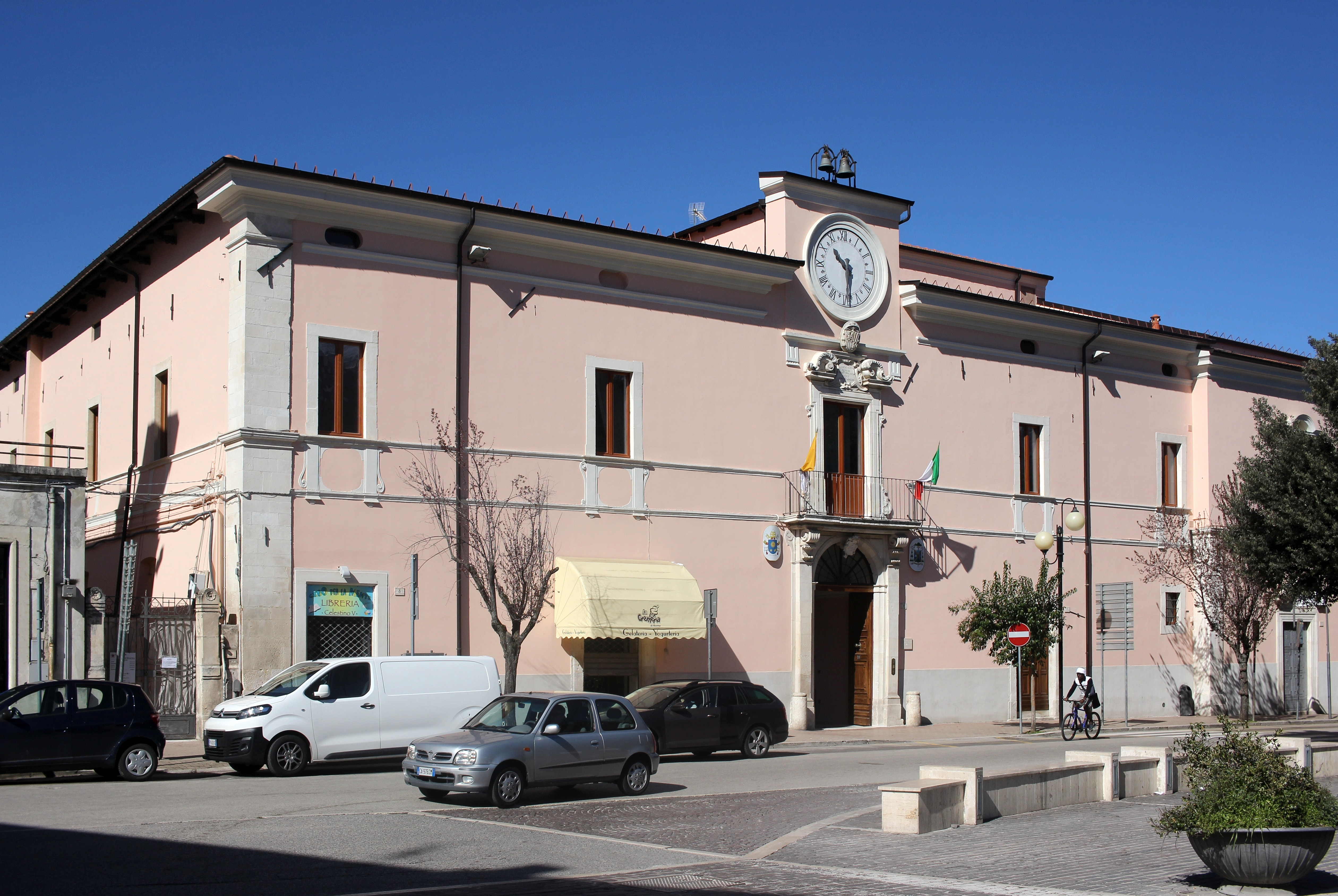 Palazzo Vescovile in Sulmona